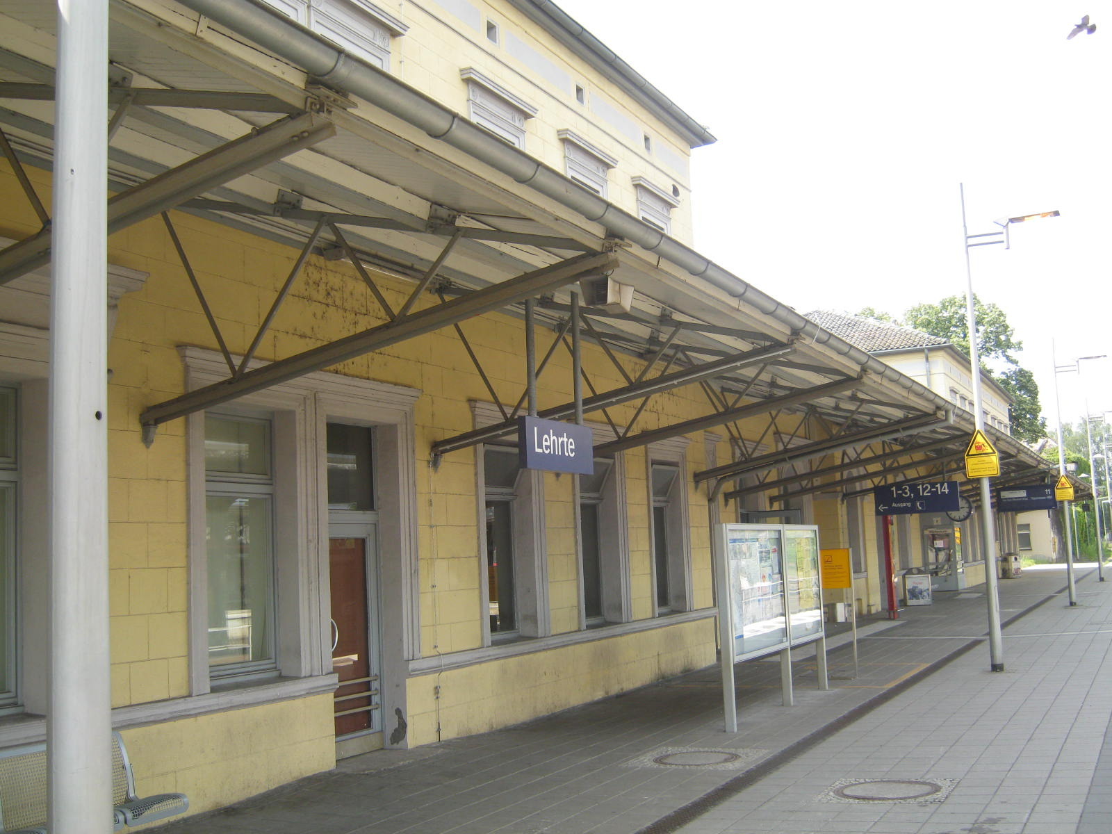 Ein Bahnsteig des Bahnhofes Lehrte.